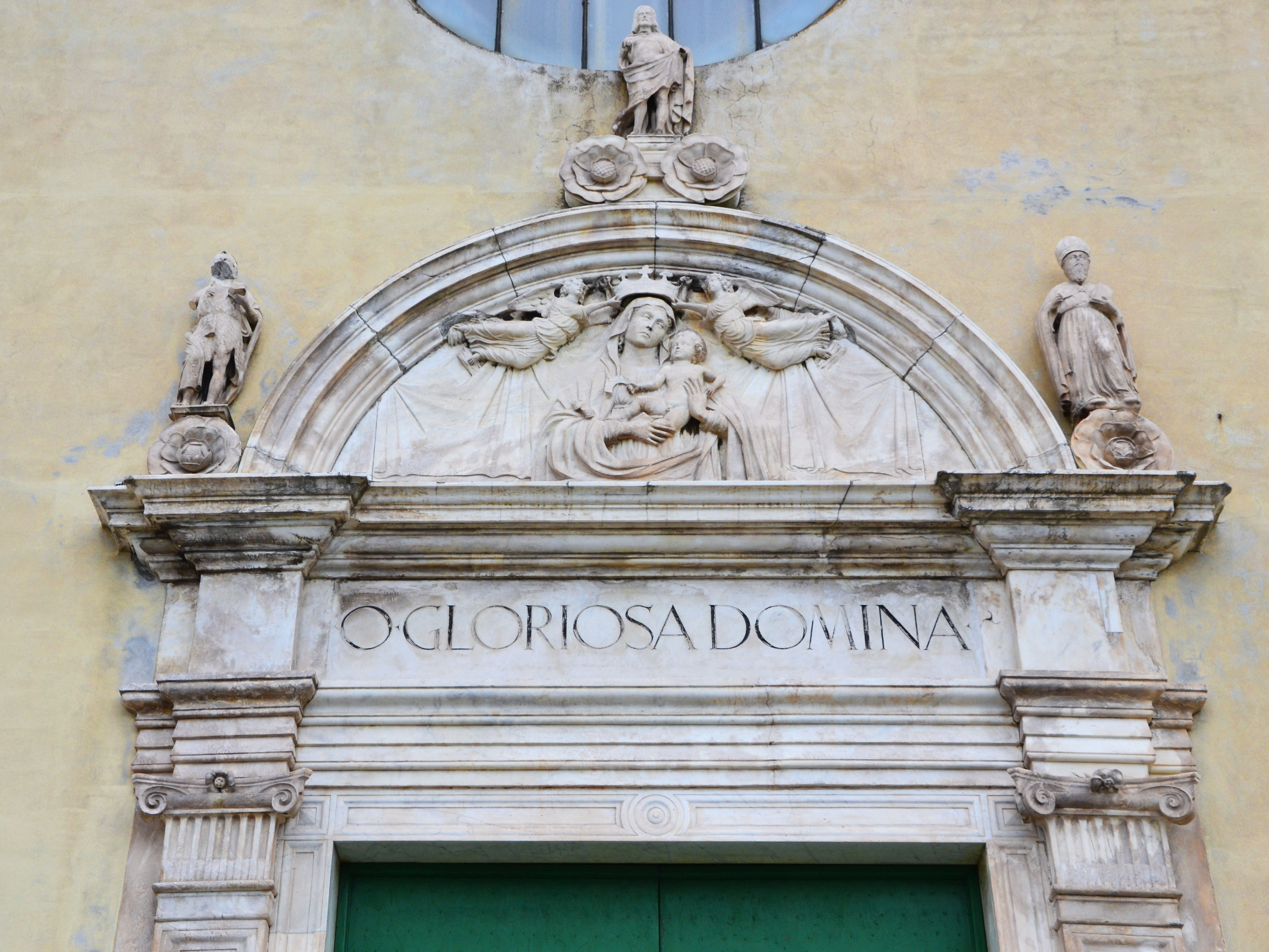 Santuario di Nostra Signora Incoronata (Coronata, Genova)